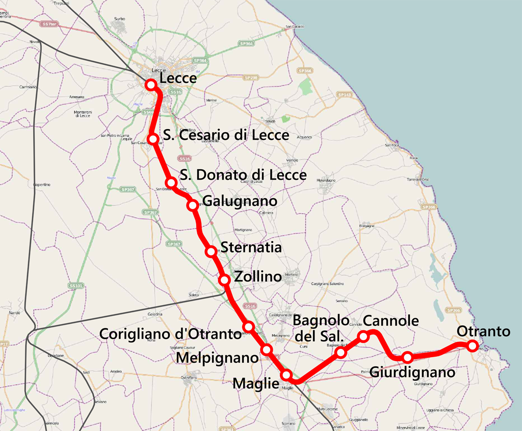 Mappa della ferrovia Lecce-Otranto.